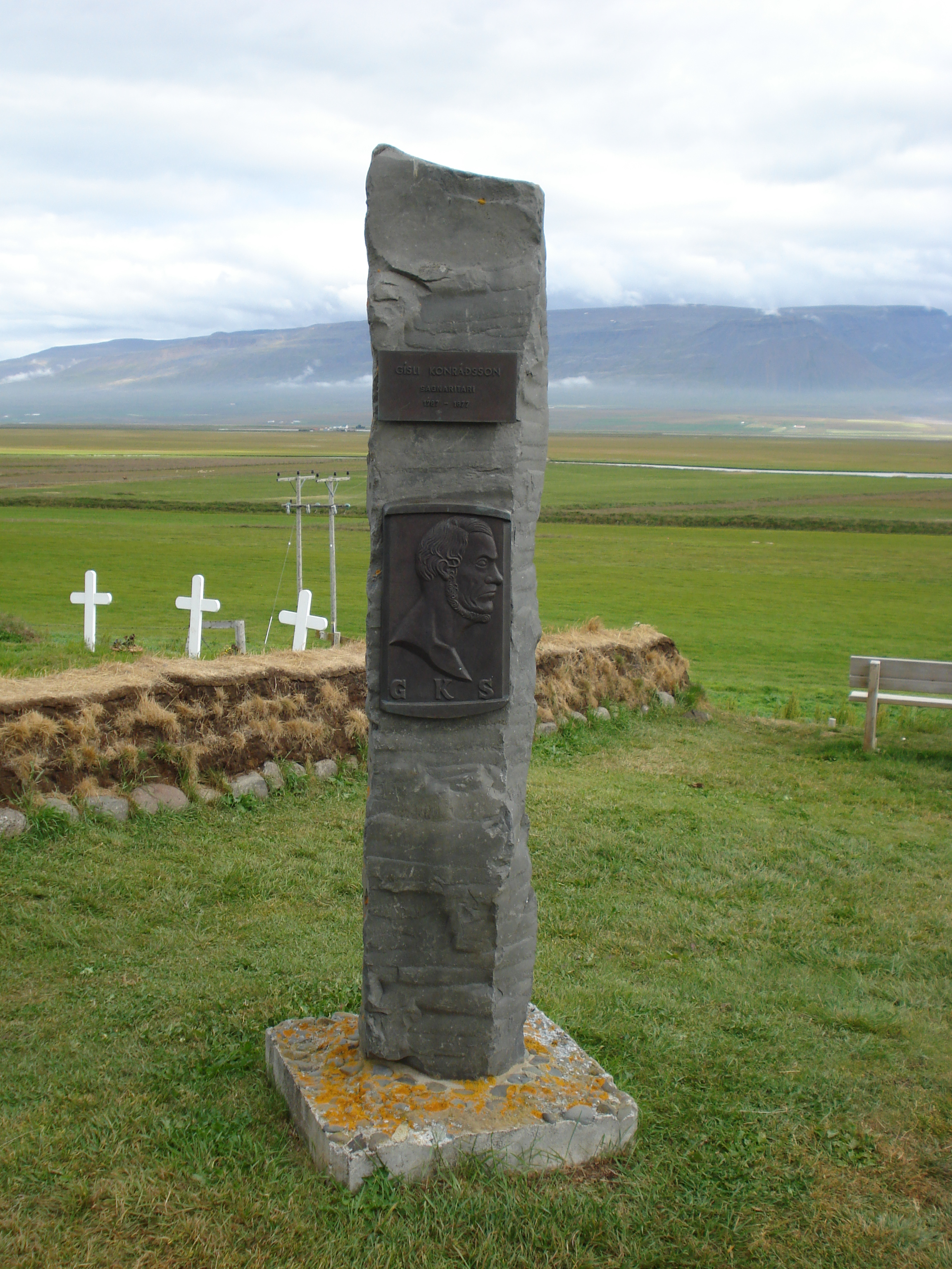 Gísli Konráðsson, Glaumbær, Sagnaritari, 1787-1877